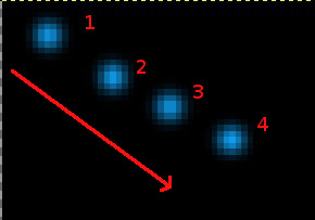 التعرف على الحركة من مجموعة من نقاط الكسل في اربعة صور رقمية متزامنة